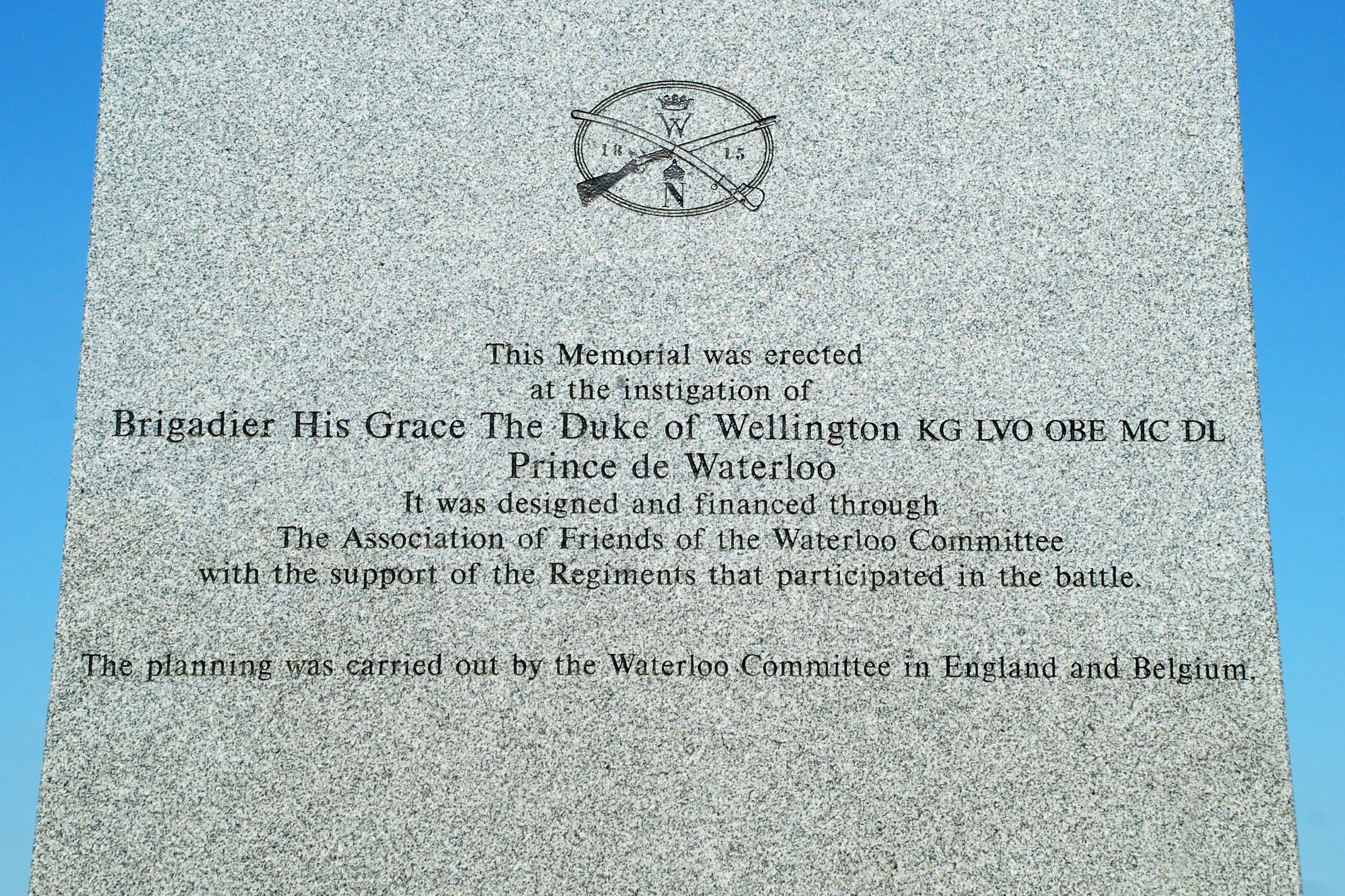 Belgique - Brabant wallon - Genappe - Monument aux troupes britanniques et hanovriennes